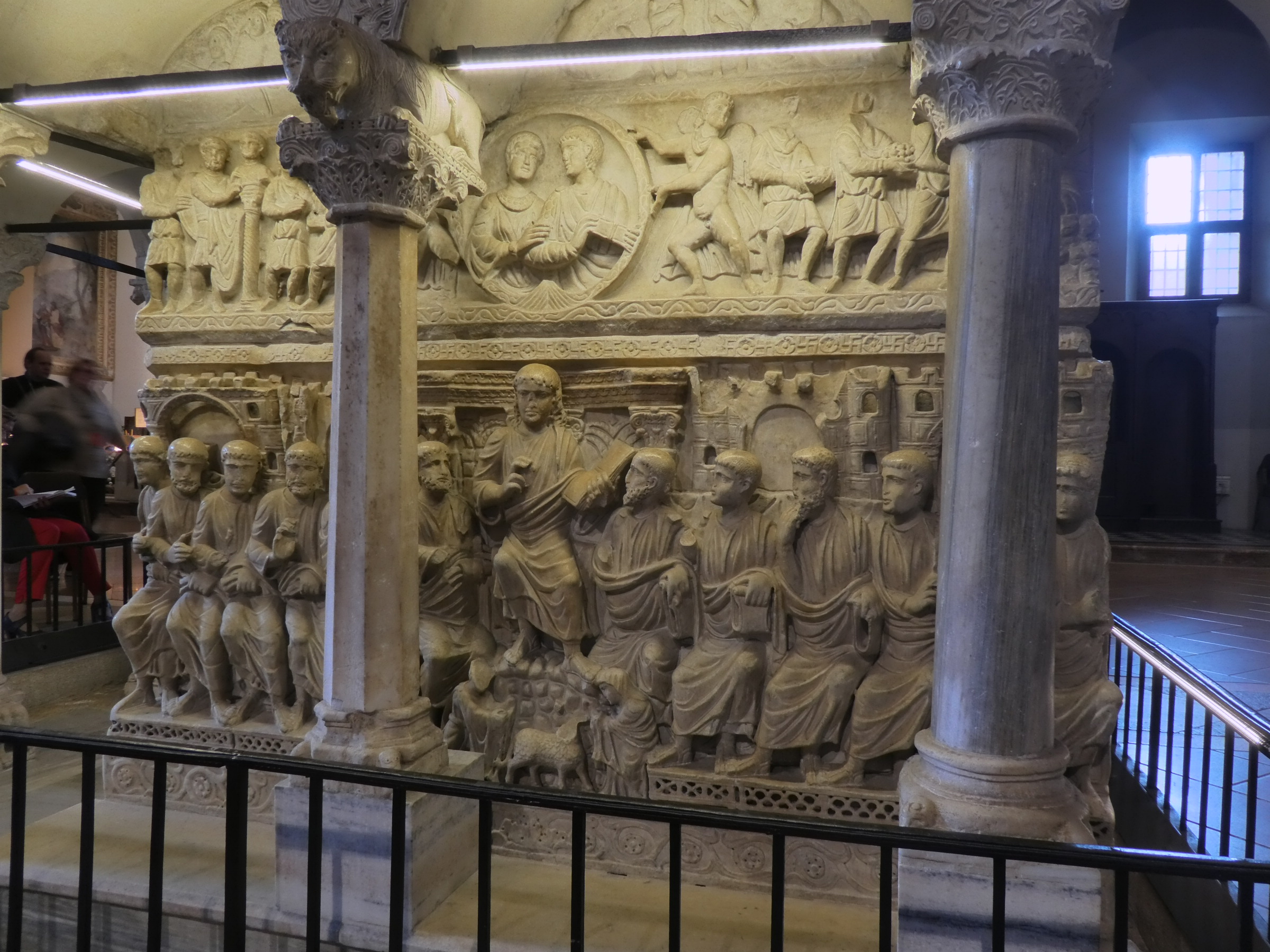 Basilique Saint-Ambroise de Milan: ambon